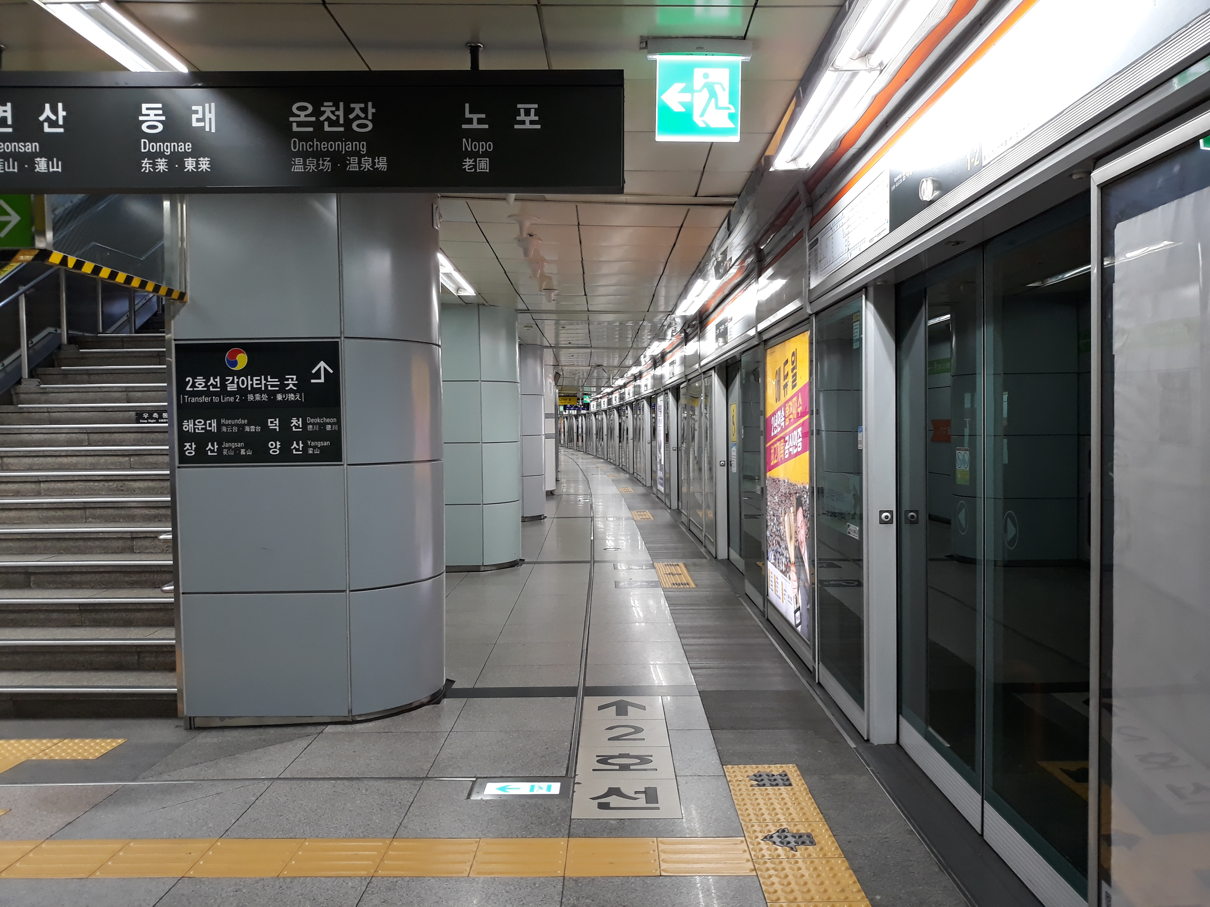 부산 도시철도 1호선 서면역 노포 방면 승강장